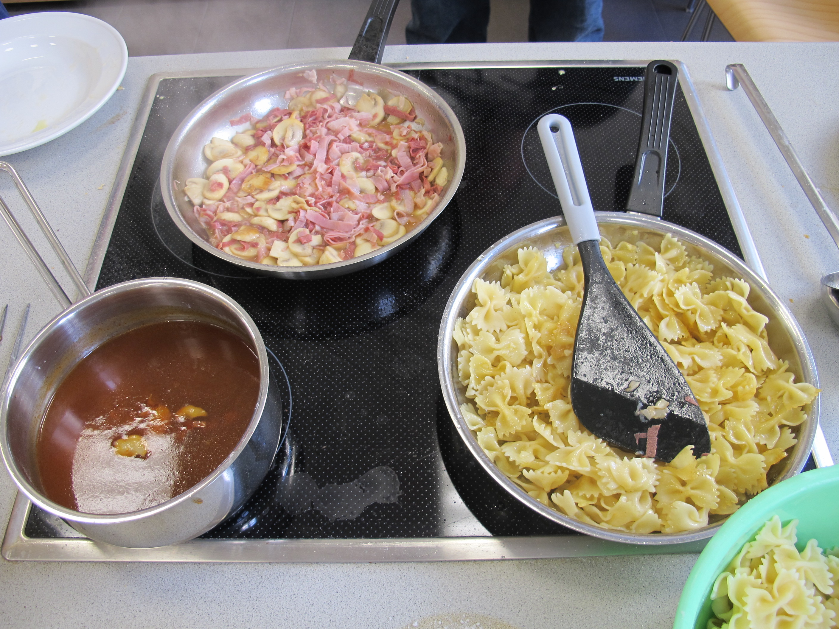 Portal Essen und Trinken der deutschsprachigen Wikipedia trifft sich in Wien zum Kochen Vorbereitung Zigeunerschnitzel: hinten: Pfanne mit Pilzen, Schinken und Zungenfleisch vorne links: Tomatensauce, mit dunkler Rindsbrühe vorne rechts: italienische Nudeln als Beilage